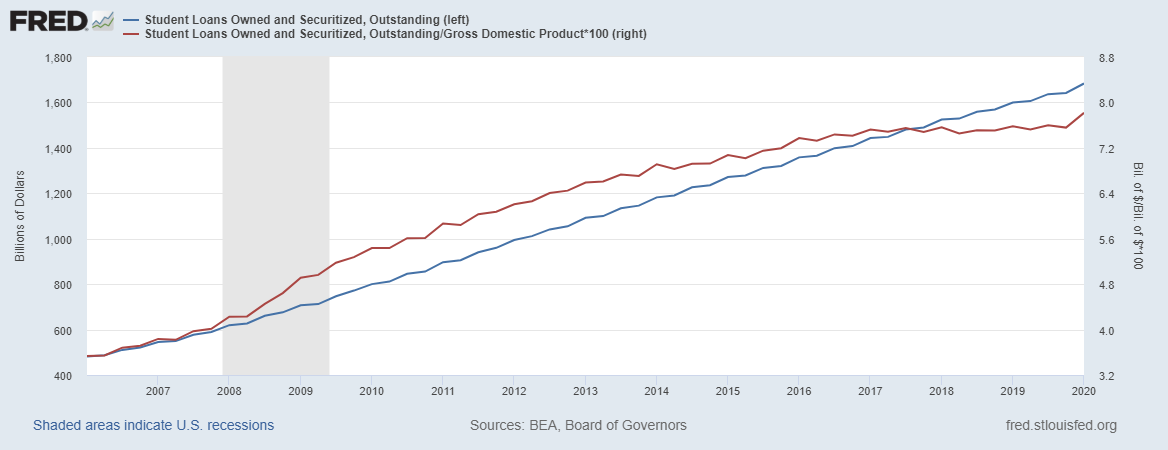 Dette étudiante américaine. Image créée par le gouvernement fédéral américain. Obtenu grâce à